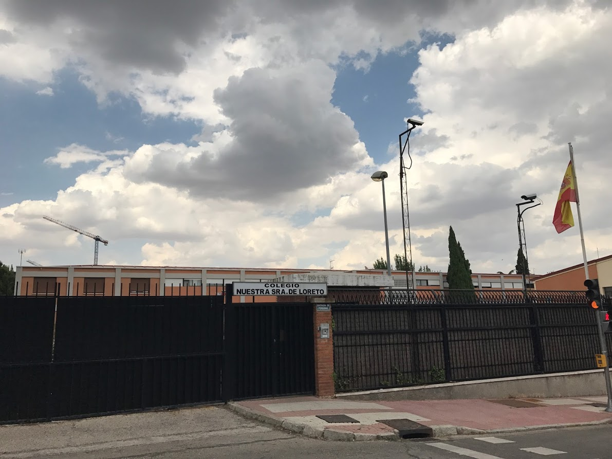 Entrada del Colegio Menor Nuestra Señora de Loreto (Madrid) en la calle General Aranaz, 66.